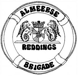 Logo AlmeerseRB